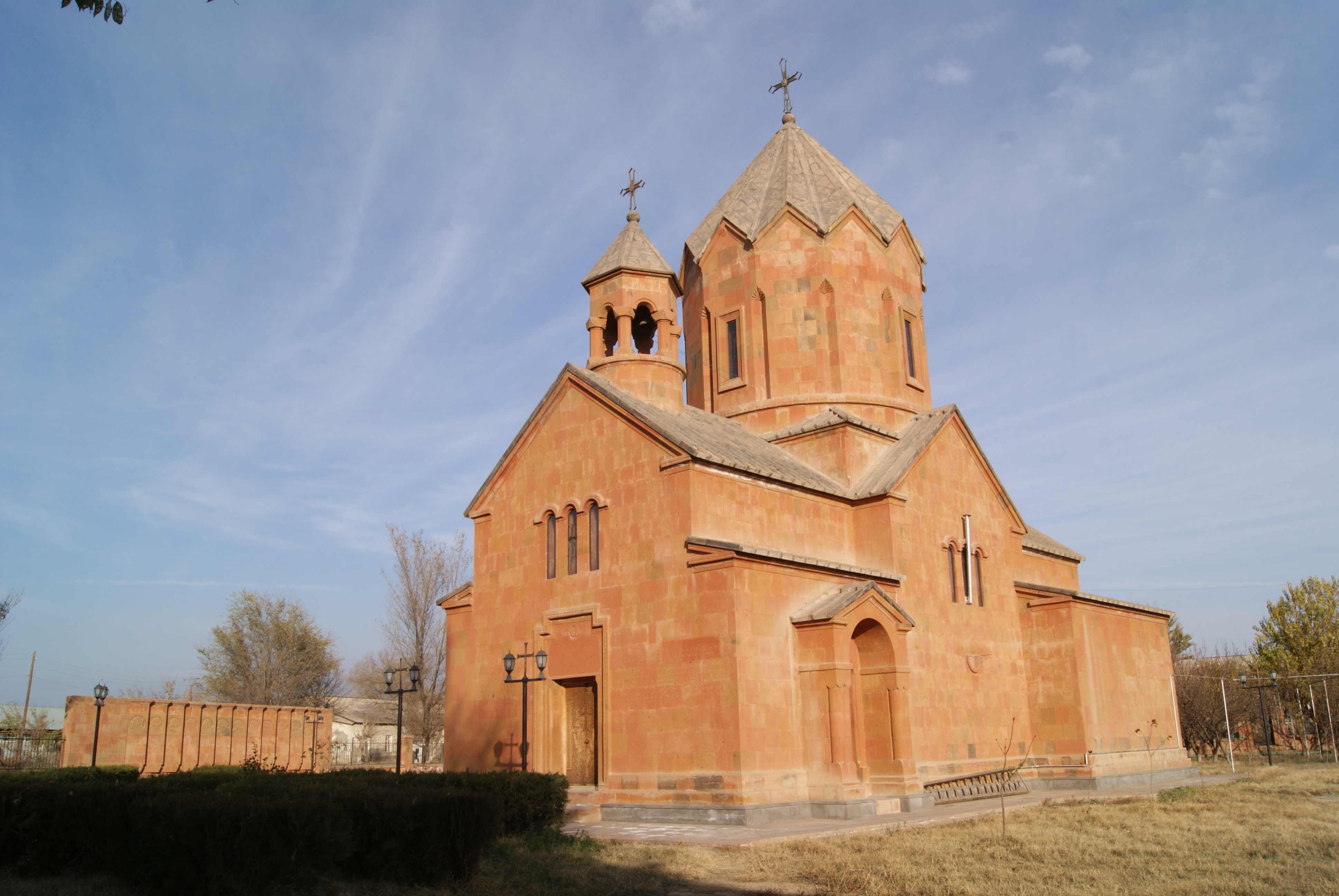 Գտնվում է Արարատի մարզի Մարմարաշեն գյուղում 1/1